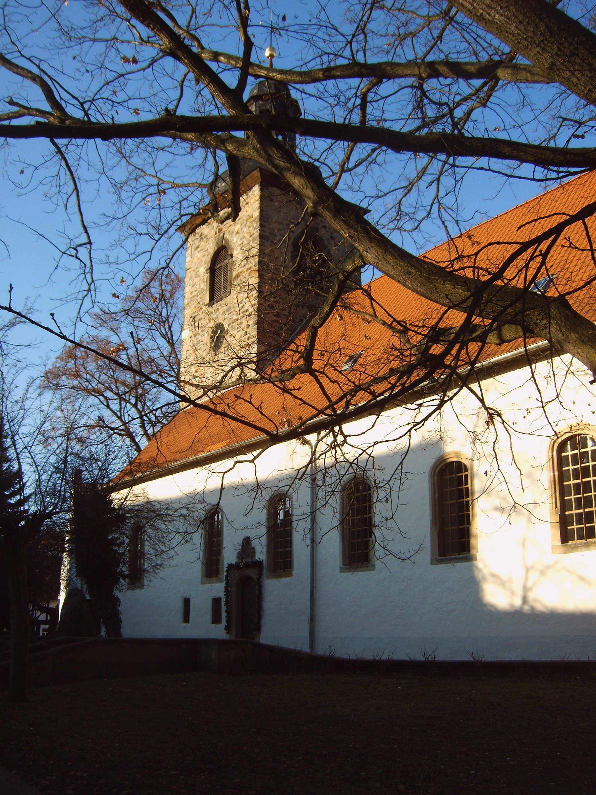 Dorfkirche Ummendorf (Börde)